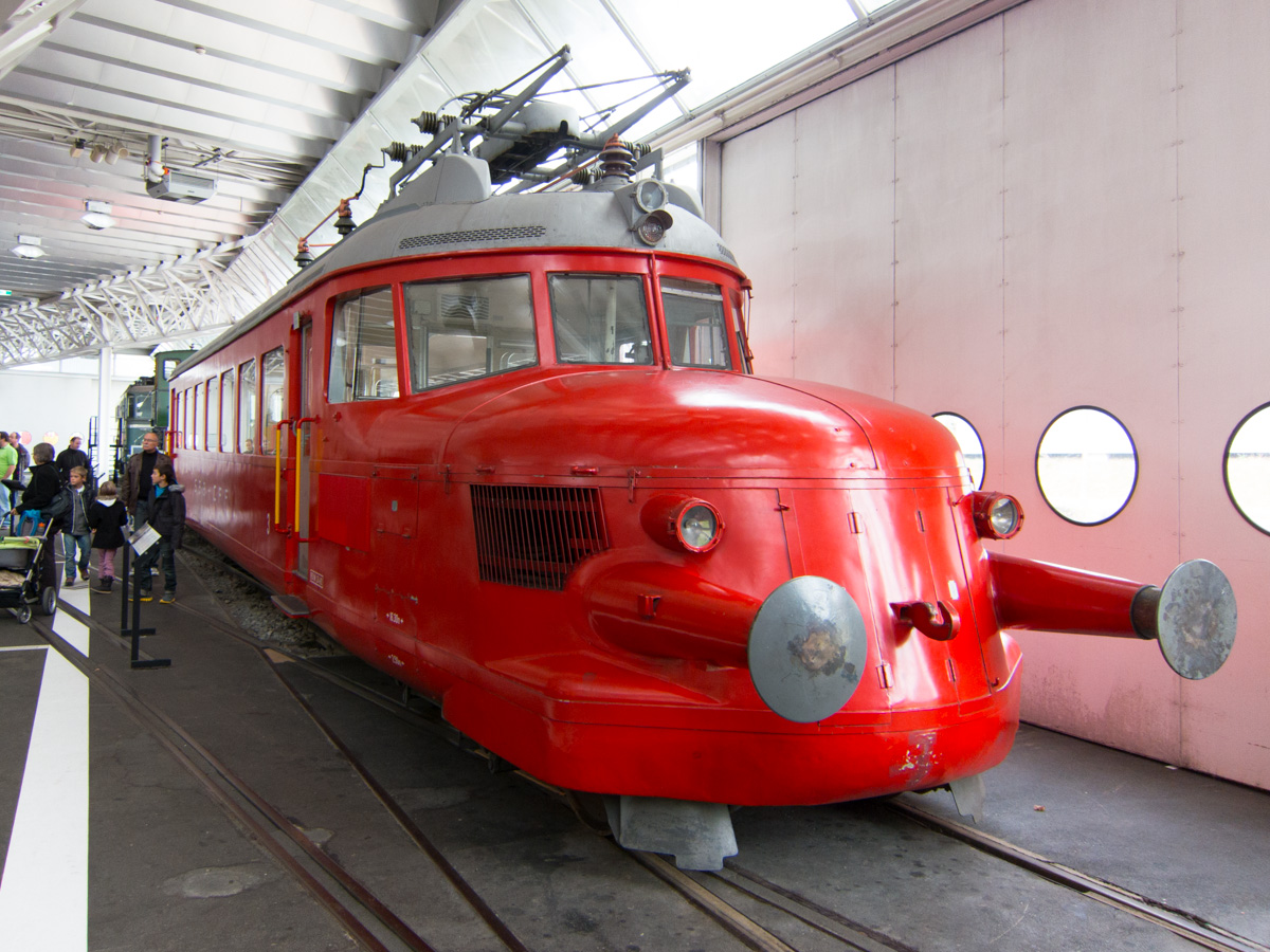 Roter Pfeil mit Original-Betriebsnummer 203 im Verkehrshaus Luzern